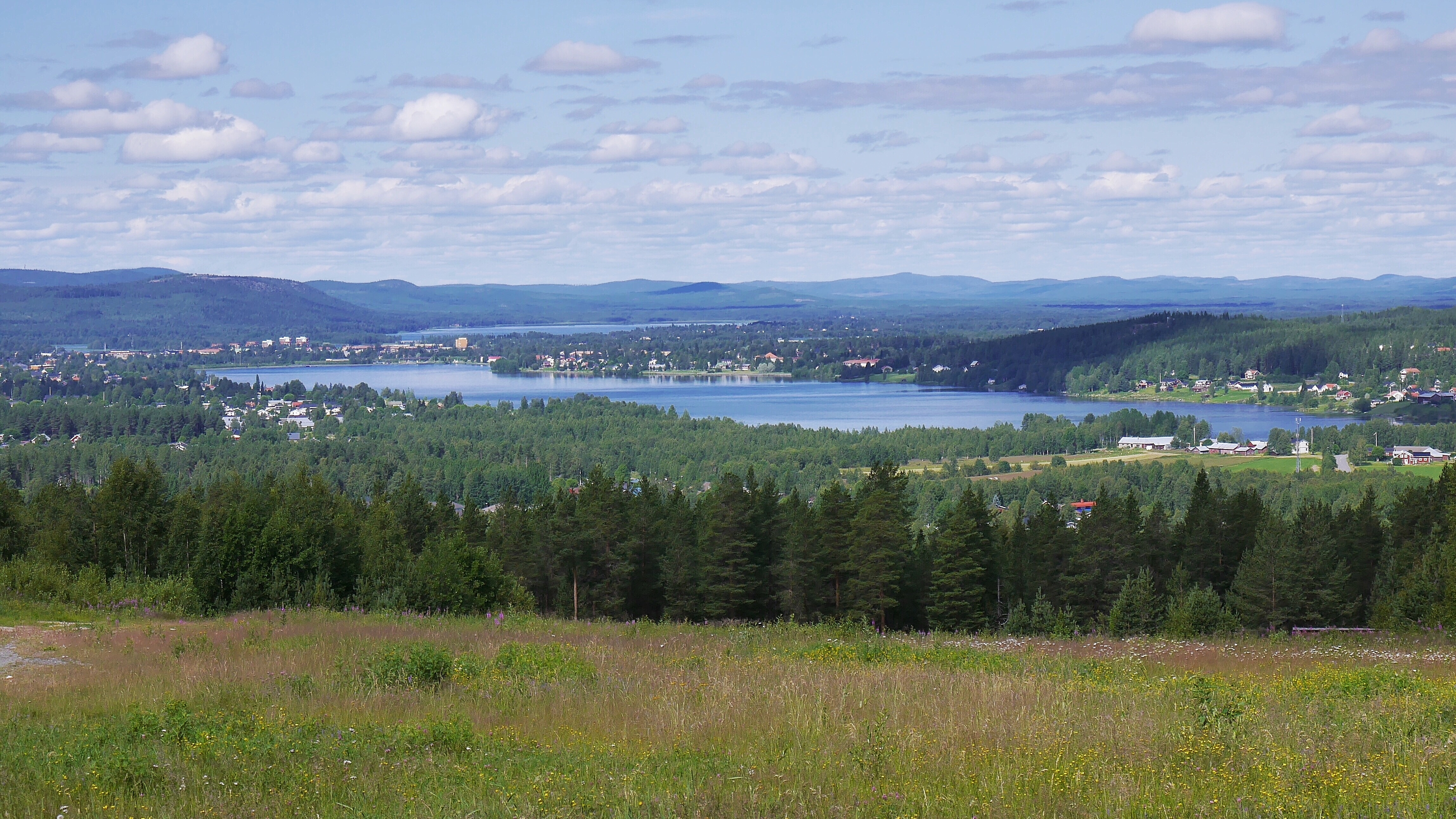 Gruvberget är ett friluftsområde i Boden. Vintertid finns en pulkbacke och möjlighet till längdskidåkning i ett 2,5 km långt elljusspår. Berget har utsikt över Bodens tätort med omnejd. På bild utsikt över Boden från bergets topp med vy över sjön Svartbyträsket, sommaren 2016.